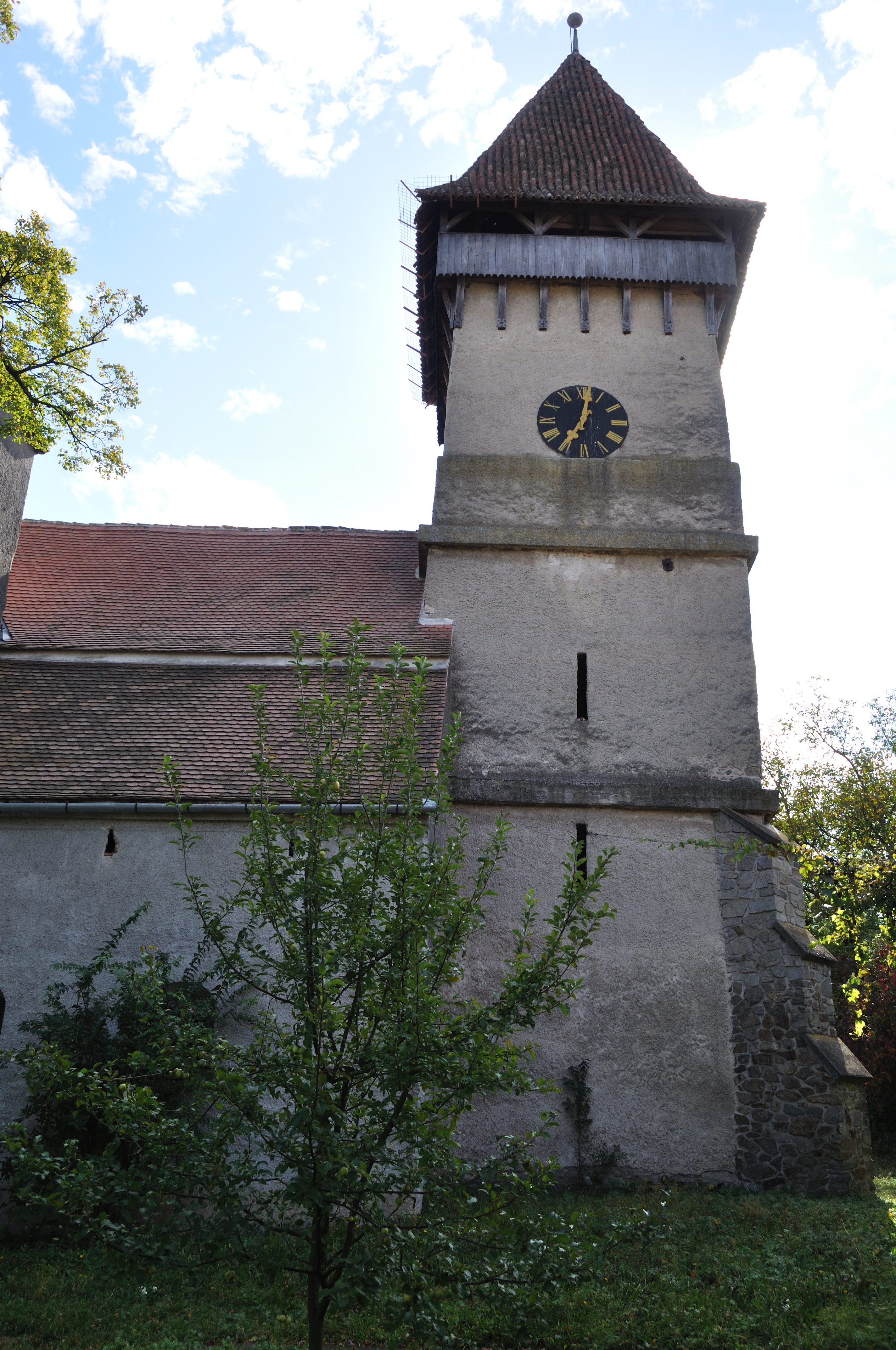 Biserica evanghelică-luterană din Șura Mică, județul Sibiu